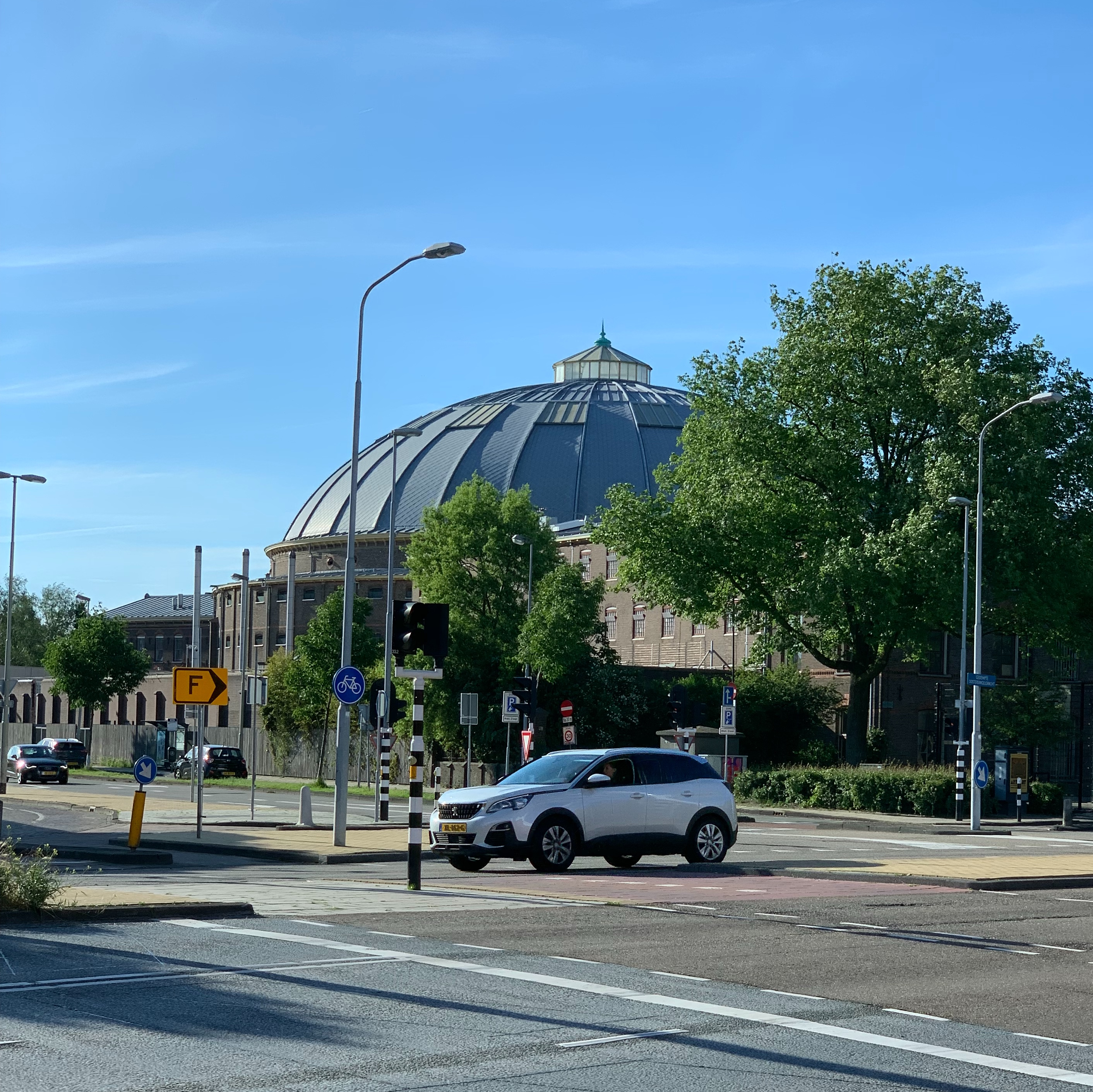 Voormalige Koepelgevangenis gezien vanaf de Gedempte Oostersingelgracht, Haarlem (16 juni 2019)